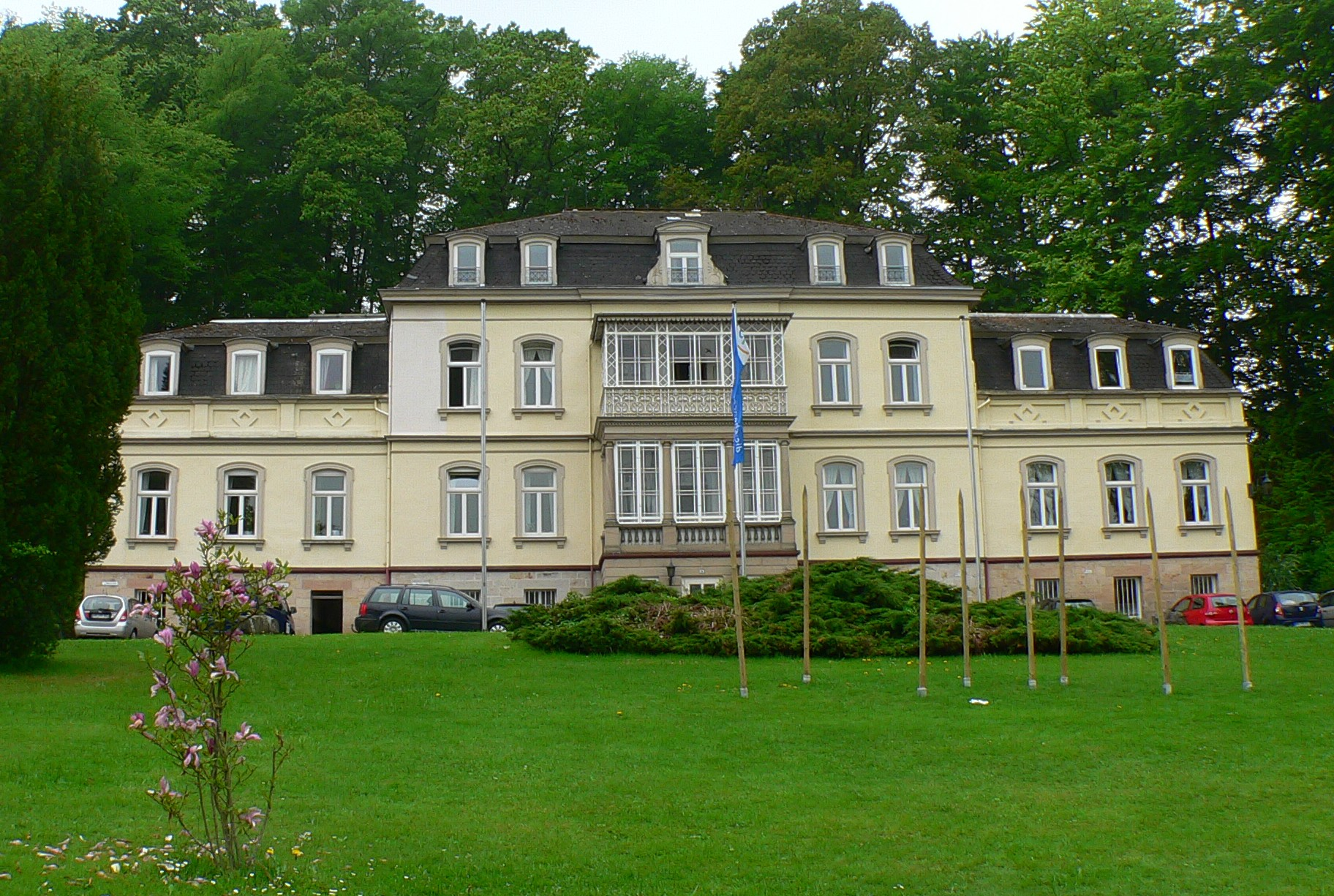 Schloss Oberurff (Hanauisches Schloss) in Bad Zwesten-Oberurff, Hessen, Regierungsbezirk Kassel, Schwalm-Eder-Kreis